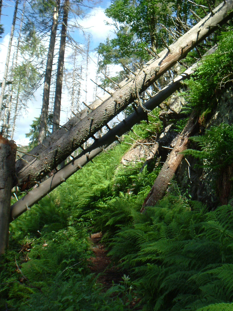 Umgestürzte Bäume am Alpinen Pfad